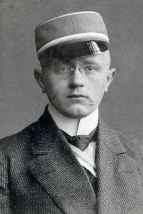 Porträtfotografie von Wilhelm Johannes Vierling